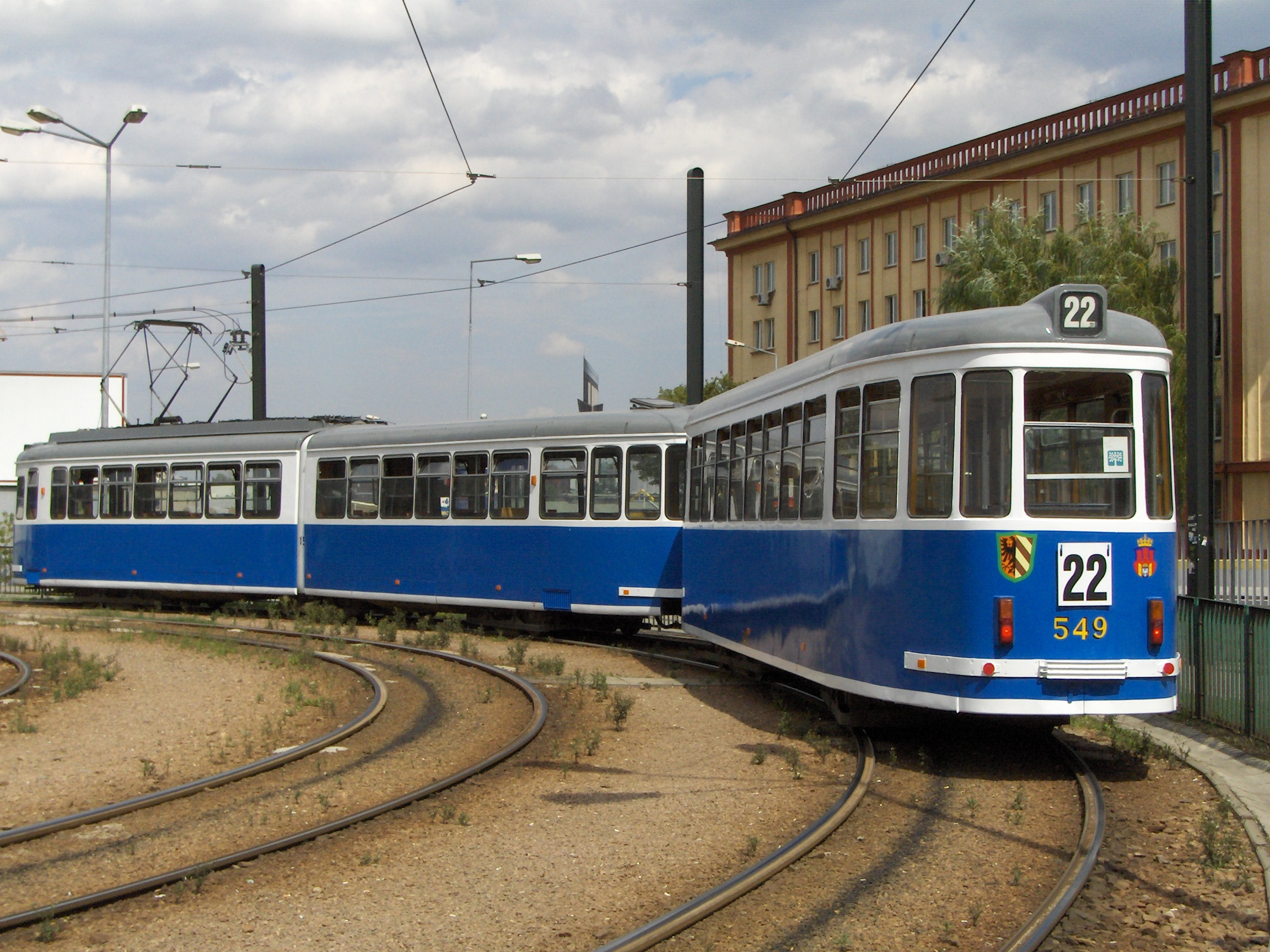 Krakowski tramwaj MAN GT6 z doczepą B4, na pętli w Borku Fałęckim. Autor: Marcin Zieliński Data: 18 Sierpień 2006